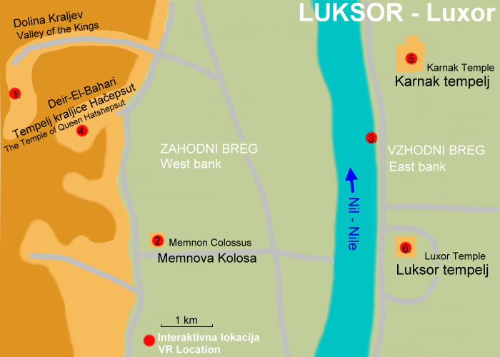 Skica območja Luksorja Kategorija:Zemljevidi